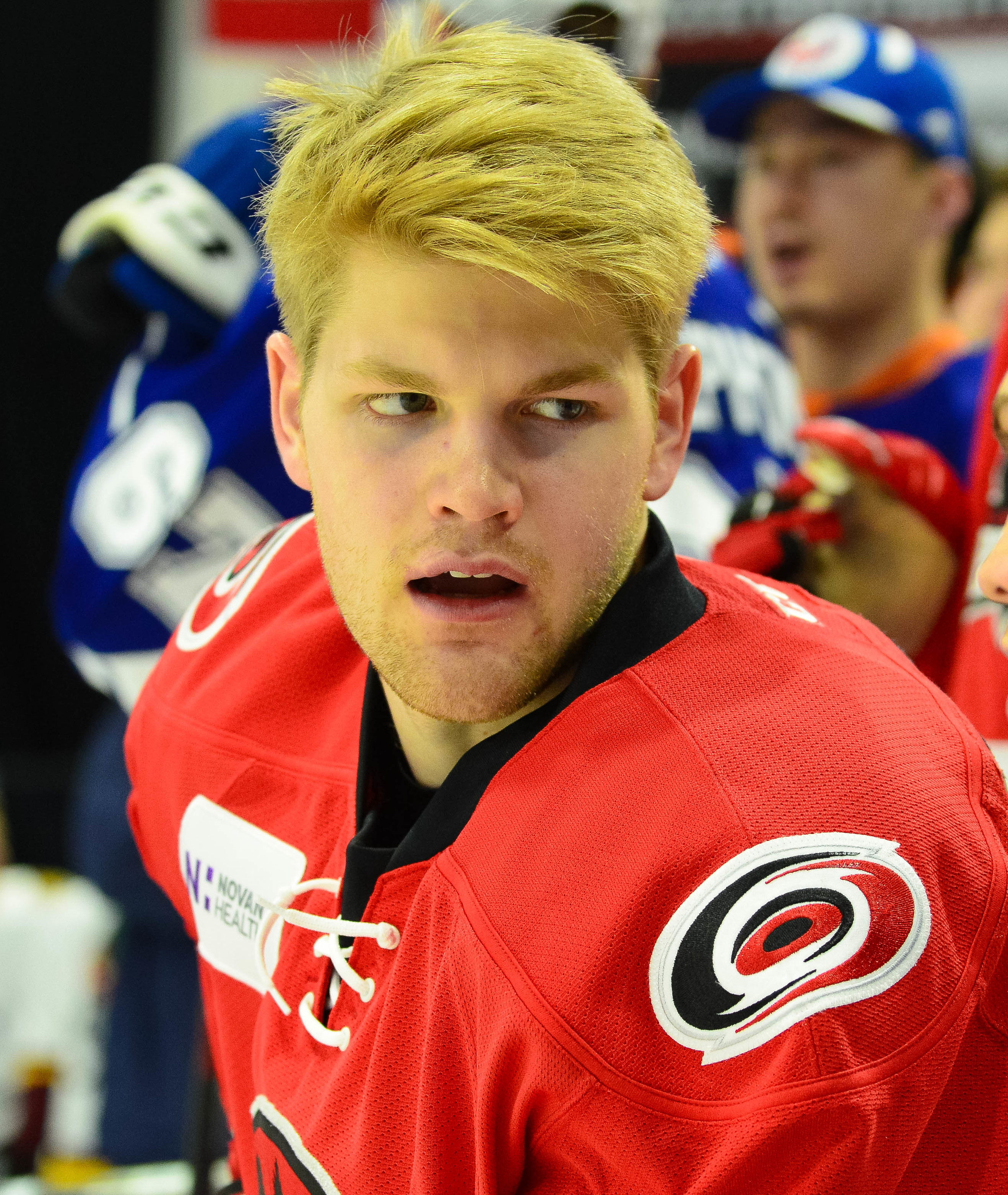 (Bryan Peck/ AHL)